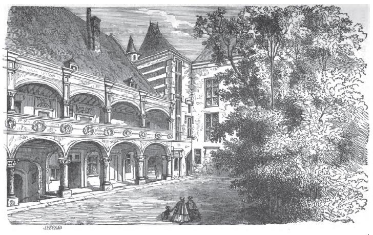 Gravure de l'hôtel d'Alluye réalisée par M. R. de Saint-Vincent (réalisée avant 1867) et tirée de l'ouvrage de Louis de La Saussaye, "Blois et ses environs: Guide historique et artistique dans le Blésois et le Nord de la Touraine", Aubry, 1867, p. 78